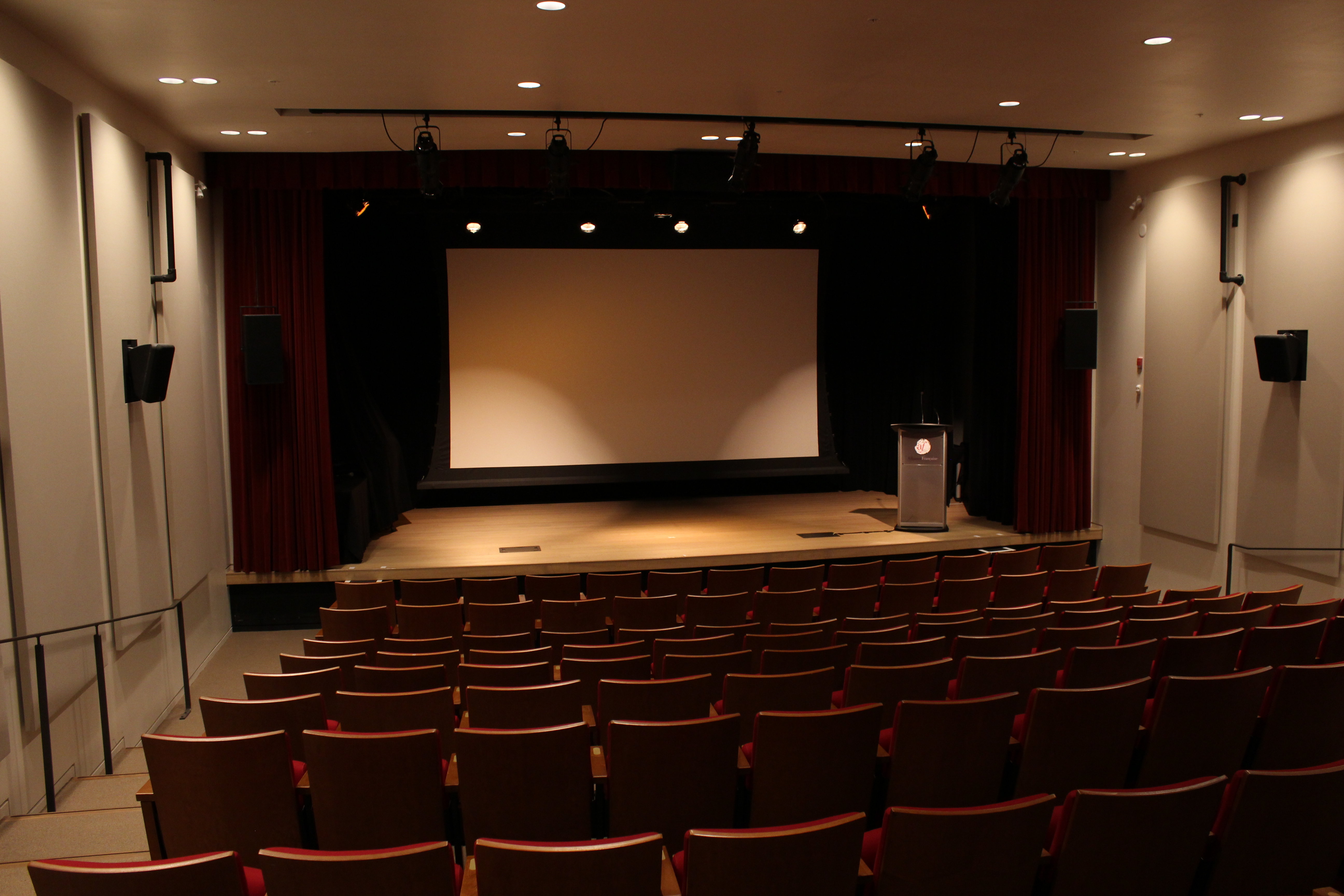 Théâtre de l'Alliance Francaise de Toronto